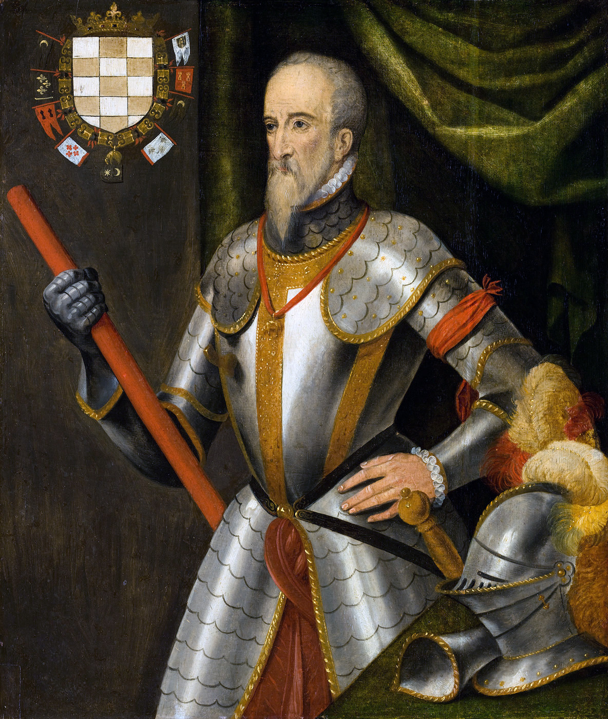 schilderij; tachtigjarige oorlog; portret; mansportret; Alva, Ferdinand Alvarez de Toledo, Hertog van